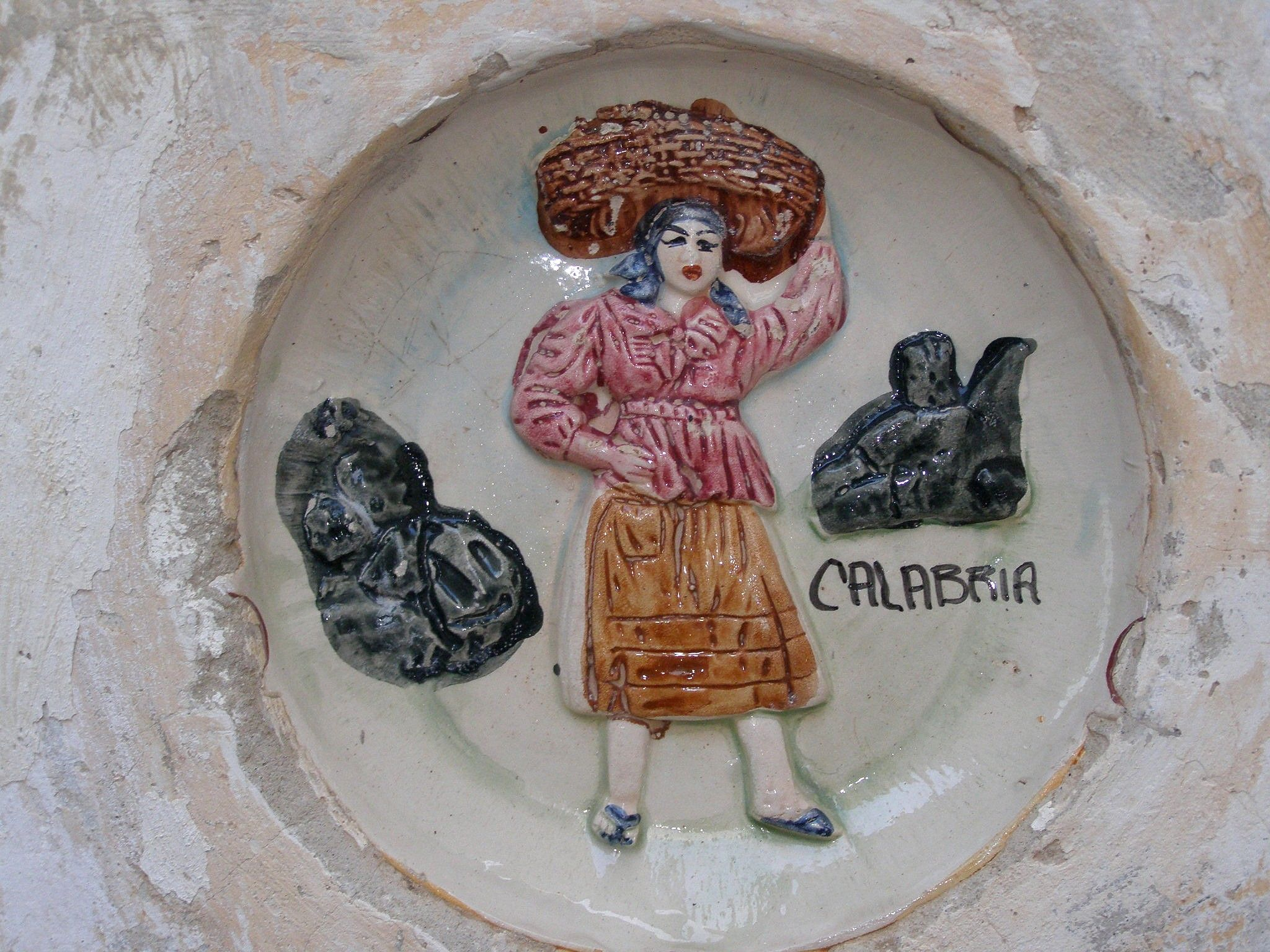 Výzdoba domu